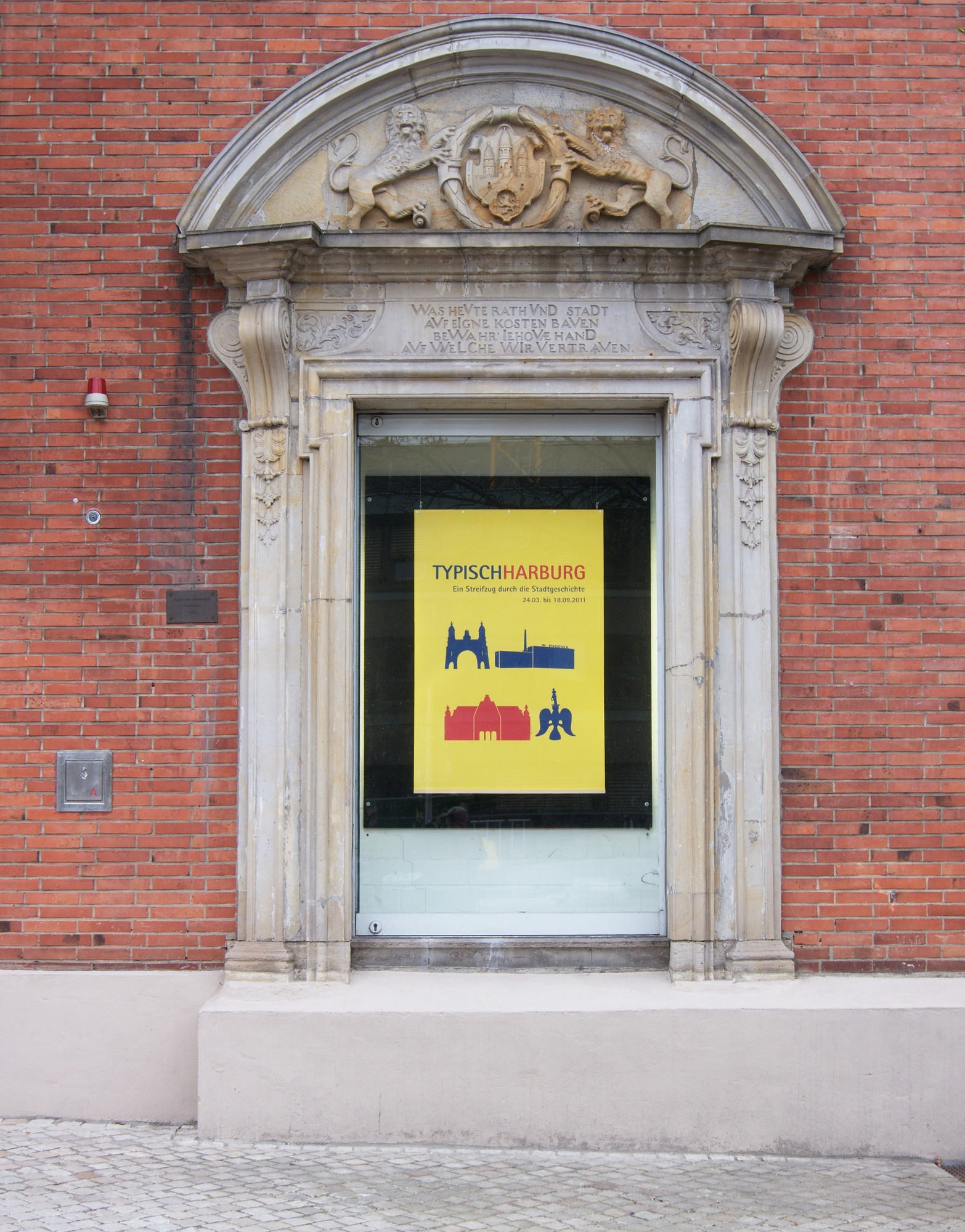 Das wiederverwendete Barockportal des ehelmaligen Harburger Rathauses von 1733 am Helmsmuseum - 11. Lange Nacht der Museen